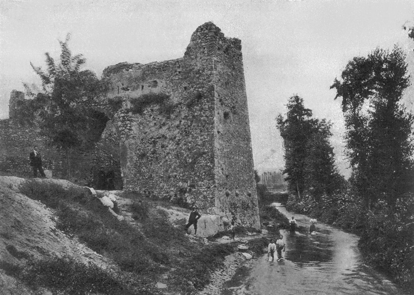 Vecchia foto di Torre della Catena, nella cinta muraria di Benevento